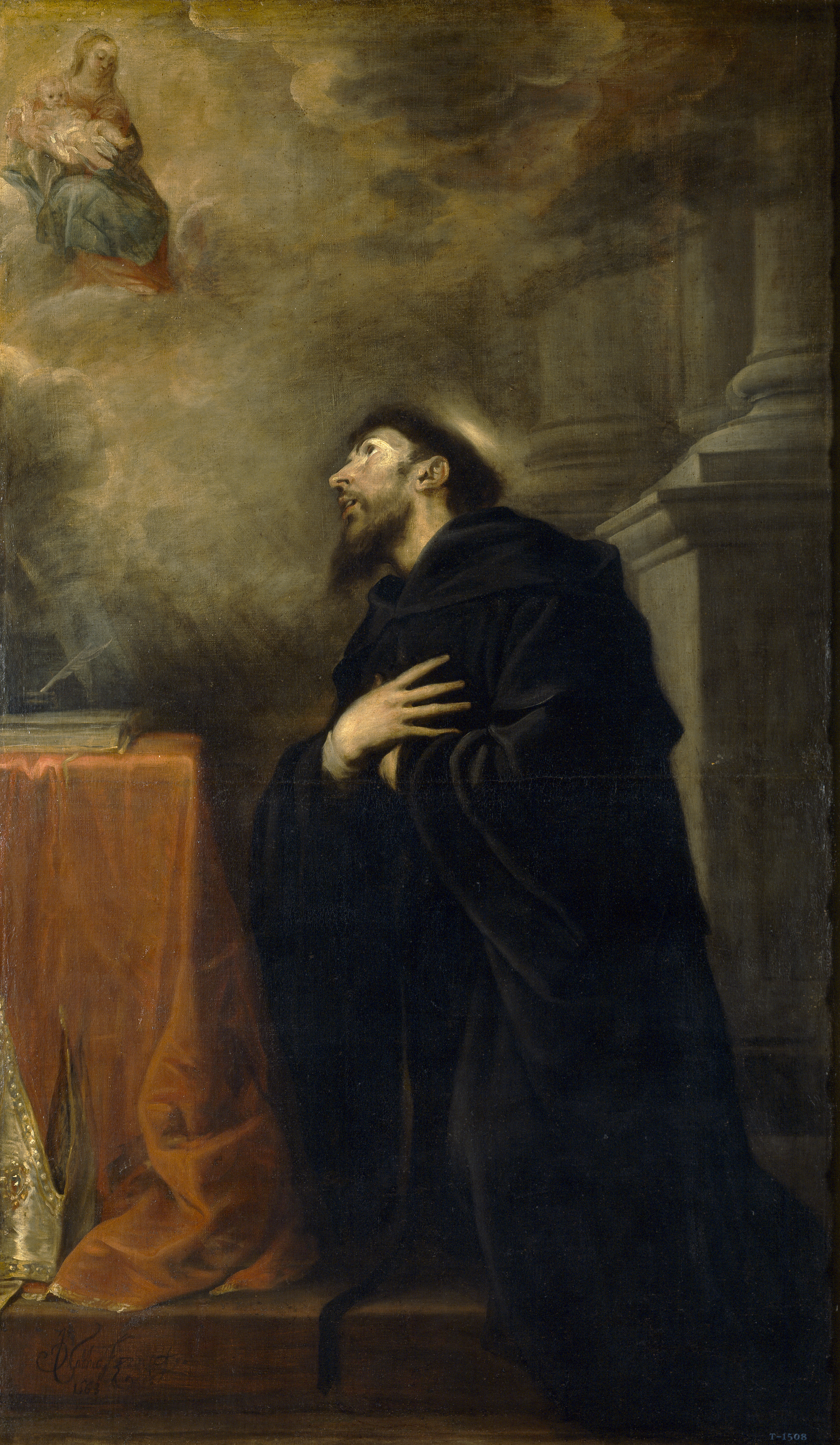 La obra representa a San Agustín de Hipona, uno de los Padres de la Iglesia, teniendo una visión.